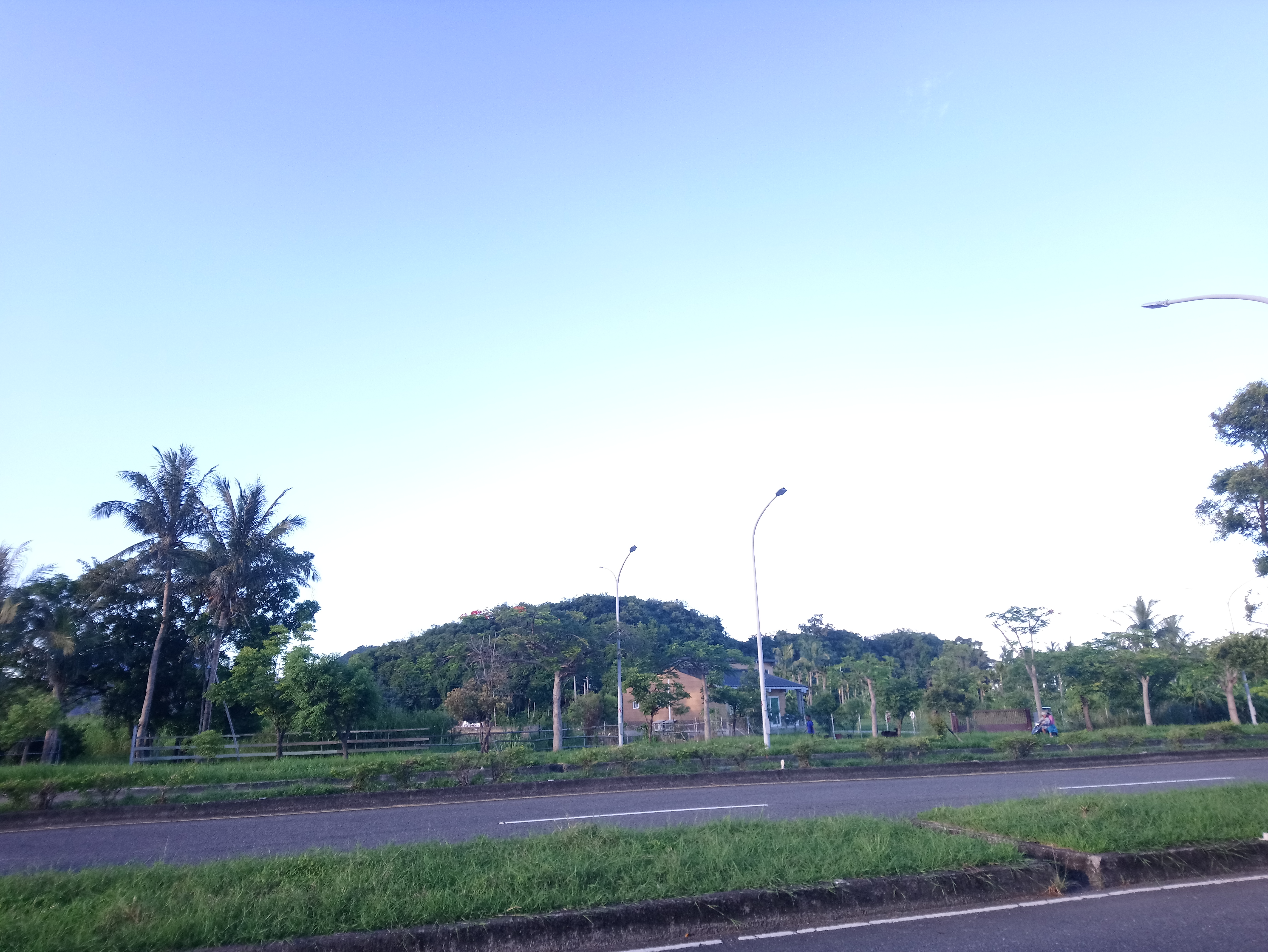 中文（台灣）: 臺灣臺東縣臺東市貓山